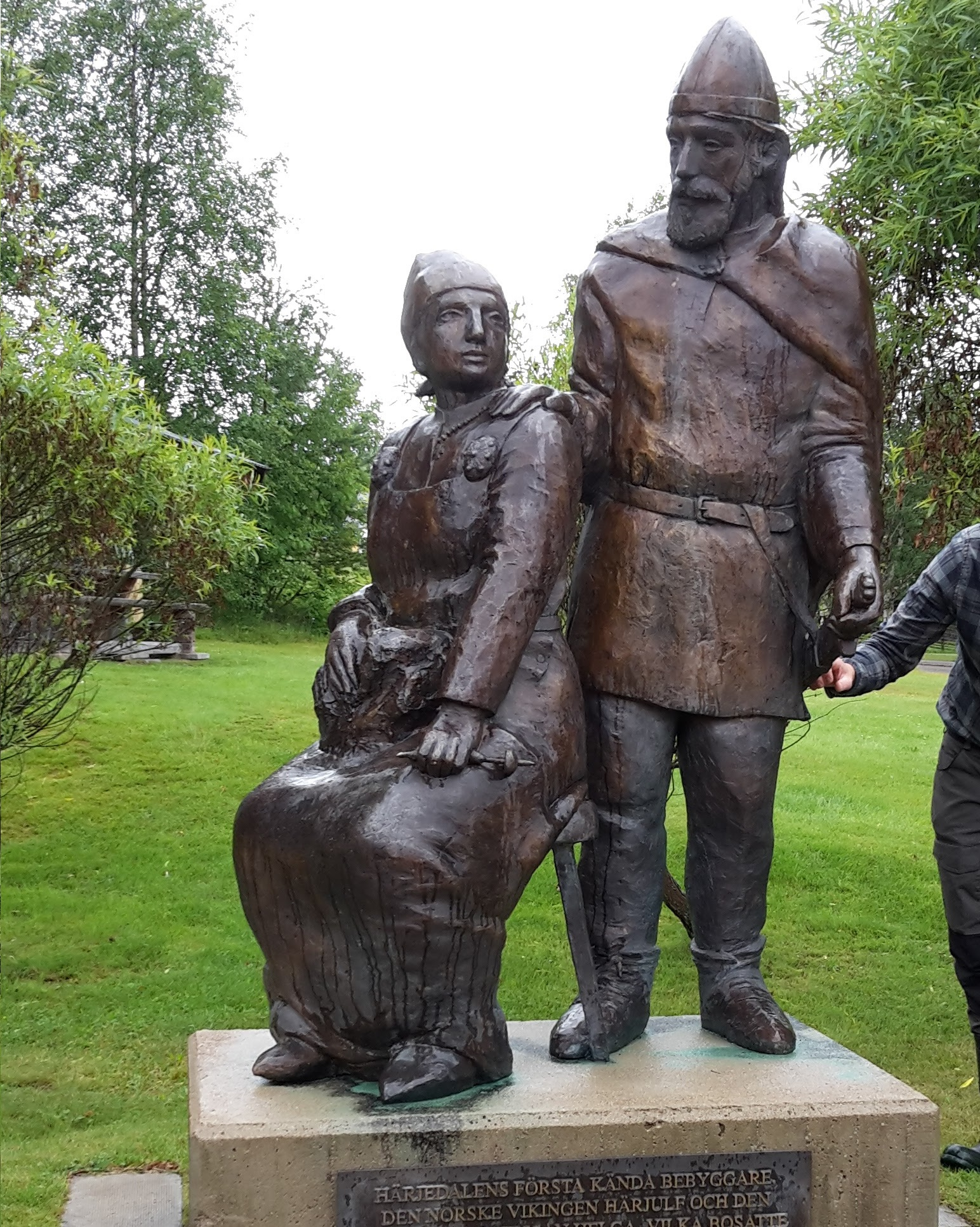 Staty av Härjulf Hornbrytare och hans fru Helga i Lillhärdal.